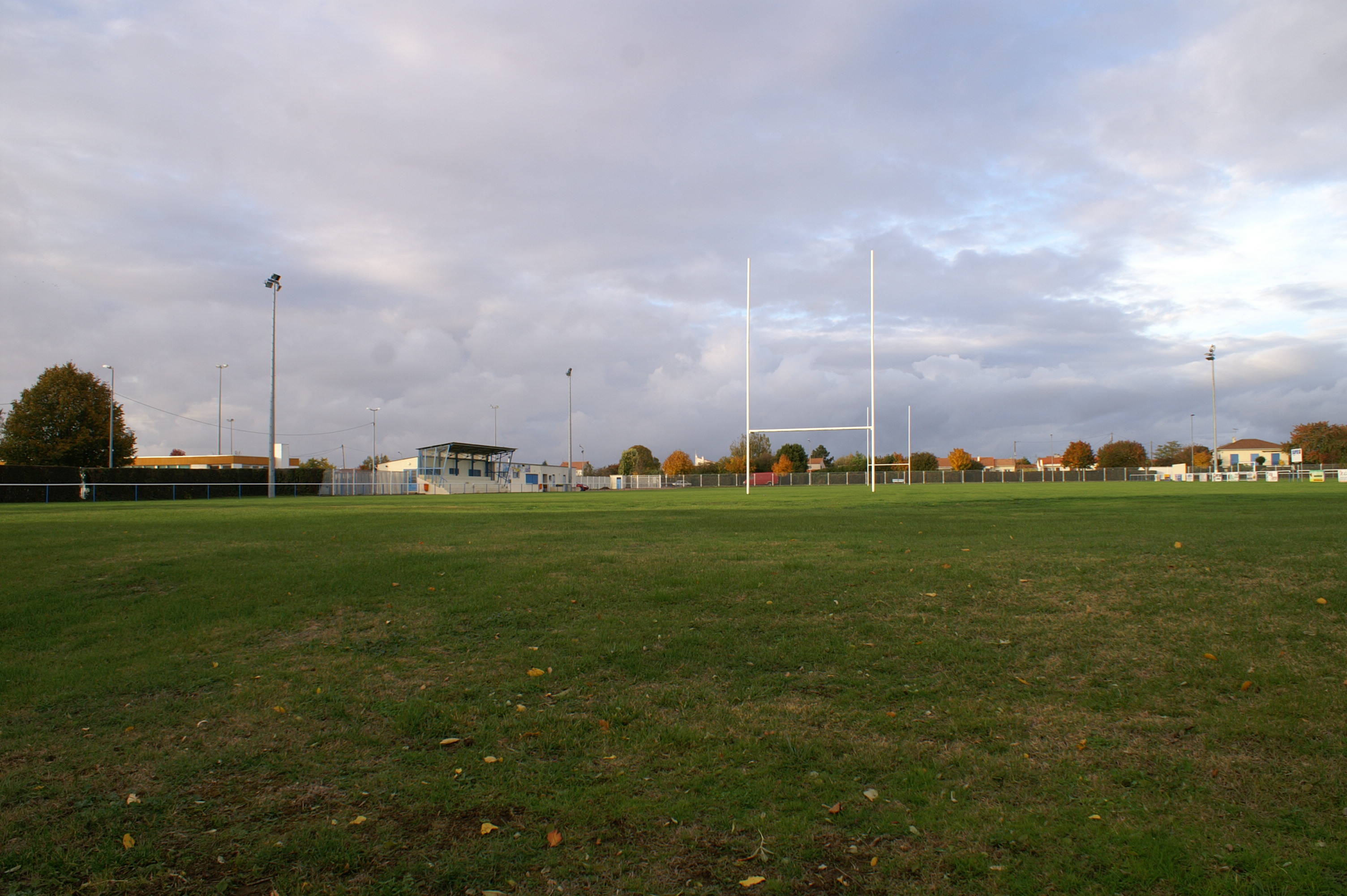 Le stade de rugby de Tonnay-Charente